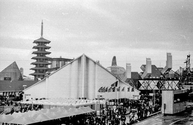 Osaka Expo 1970